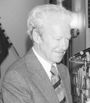 im Ratssaal des Rathauses. Der Theologe und Philosoph Prof. Dr. Knud Ejler Loegstrup (links) erhält vom Präsidenten der Christian-Albrechts-Universität (CAU) Prof. Dr. Gerd Griesser (rechts) die Verleihungsurkunde.